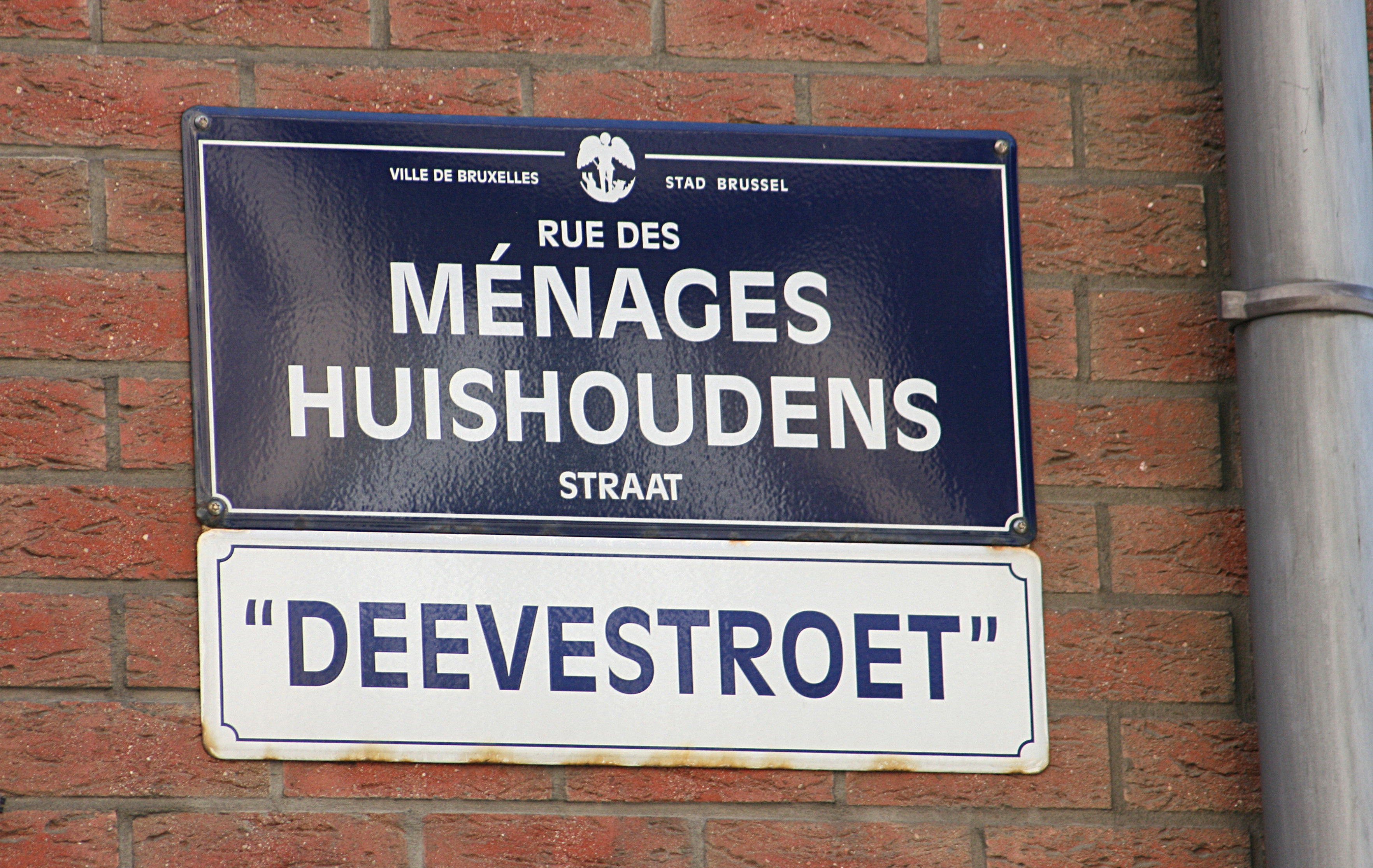 Rue des Ménages, Bruxelles (Belgique). Sous la dénomination officielle se trouve un nom populaire en dialecte marollien